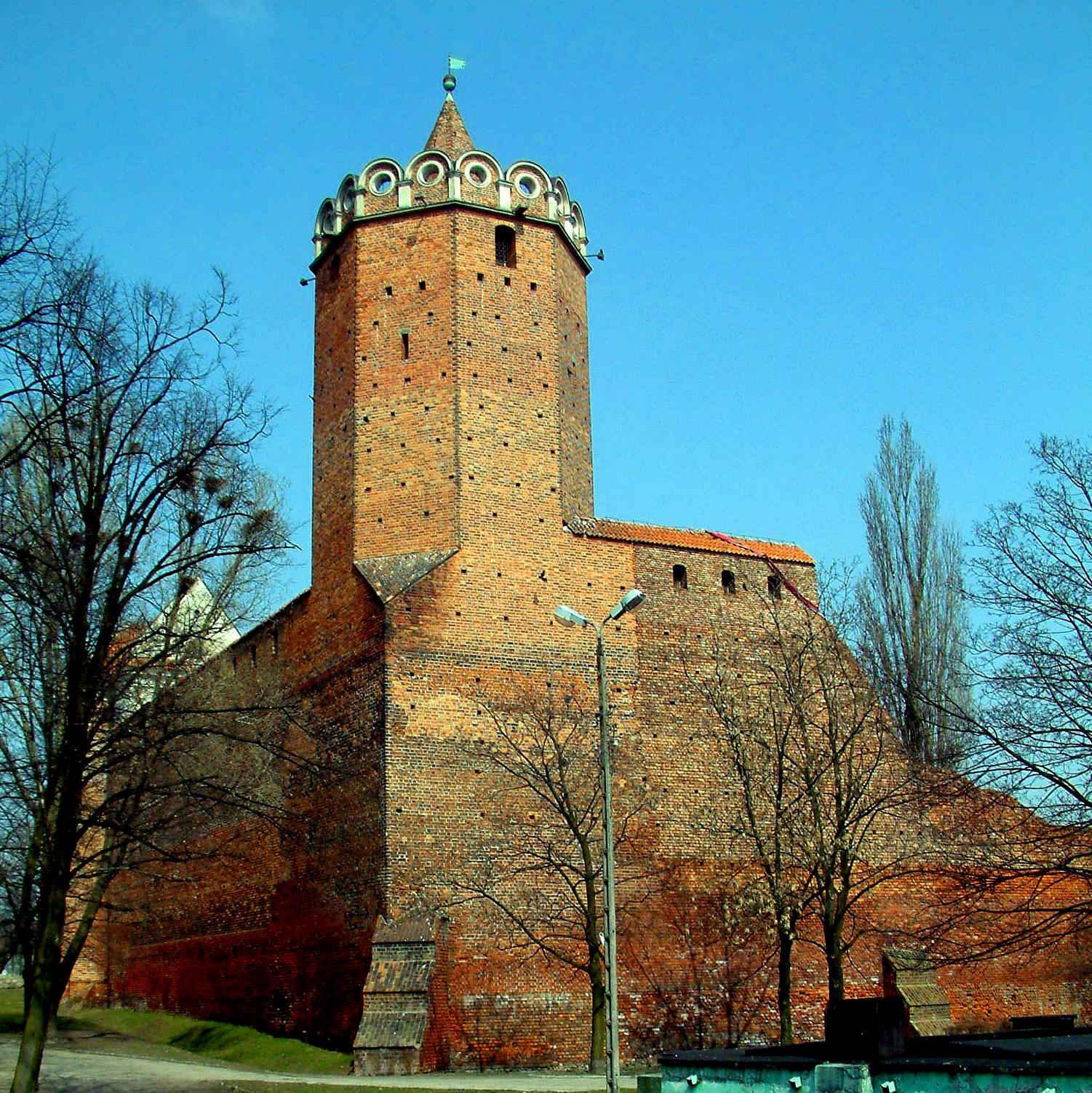 Łęczyca zamek